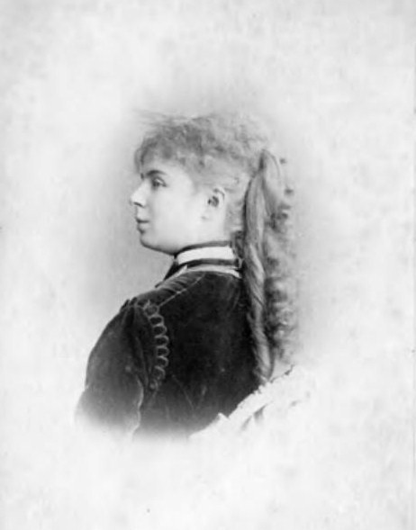 Екатерина Андреевна Бавлашова, ур. Шувалова (1848—1931)